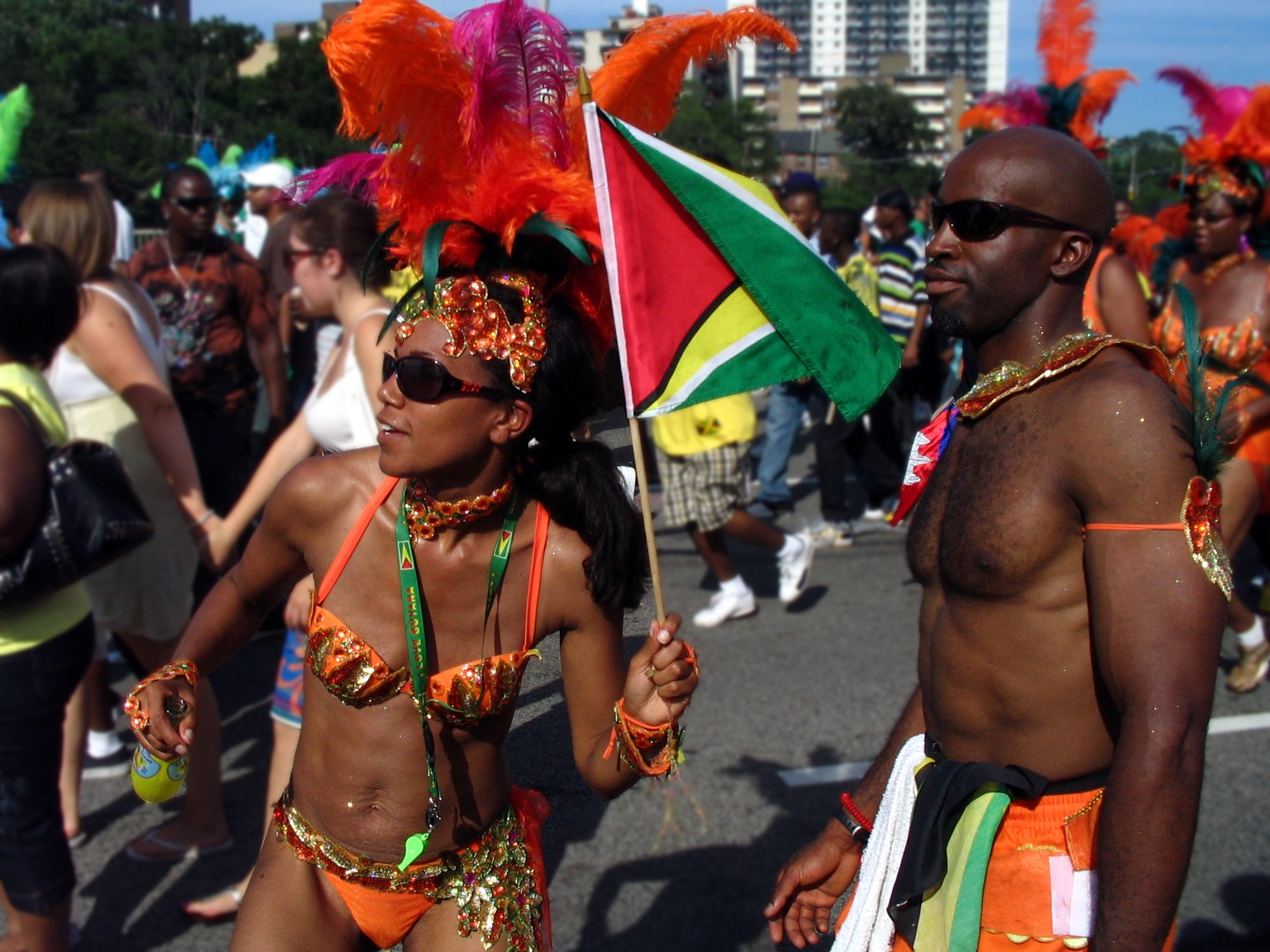 Caribana parade, Toronto